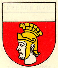 Wappen von Poliez-Pittet Kanton Waadt Schweiz